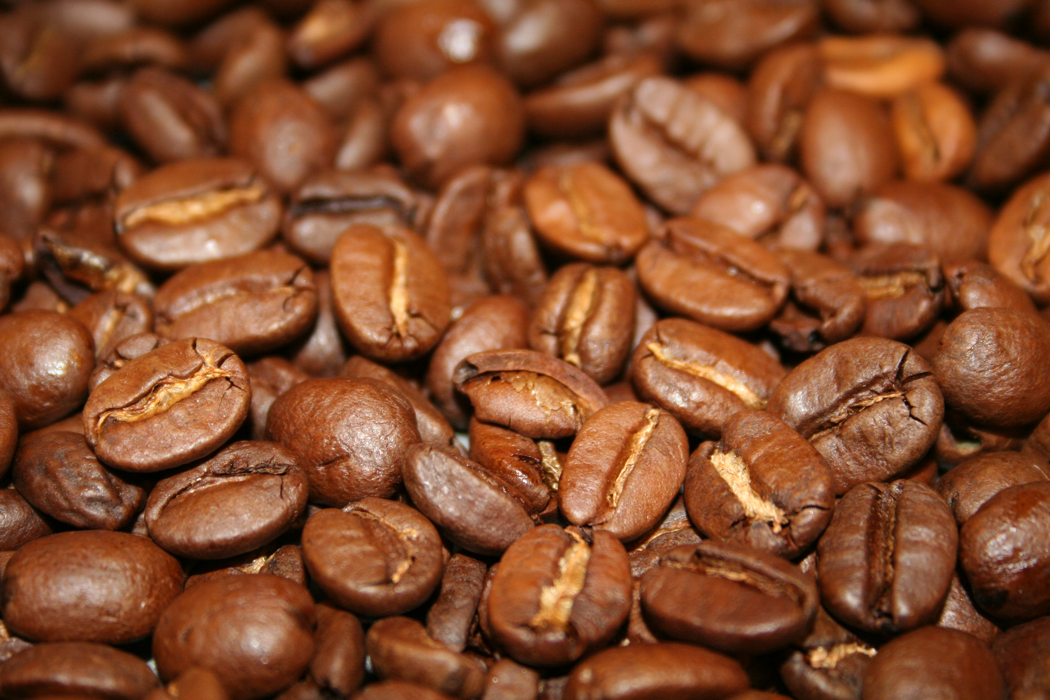 Kaffeebohnen - Nr. 001 Coffeebeans - No. 001